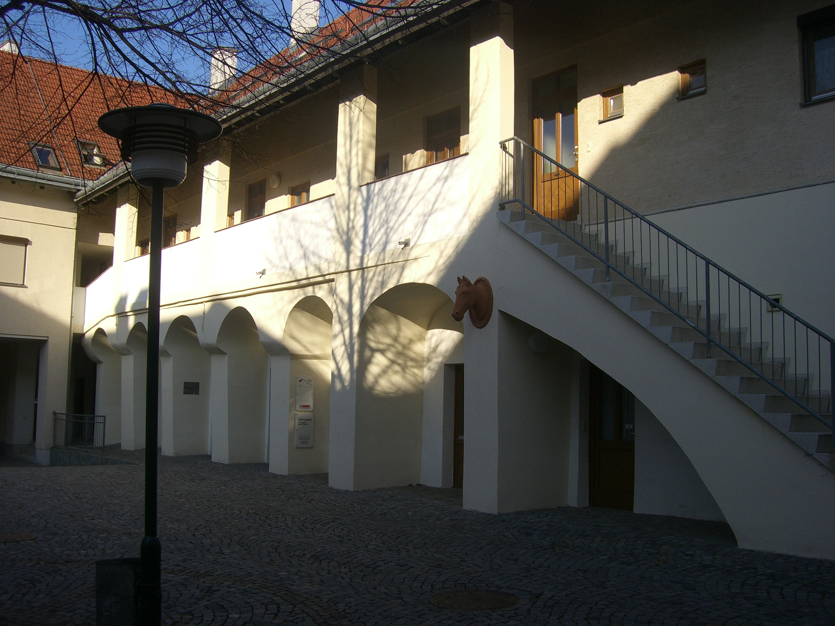 Loosdorfer Rathaus, Innenhof